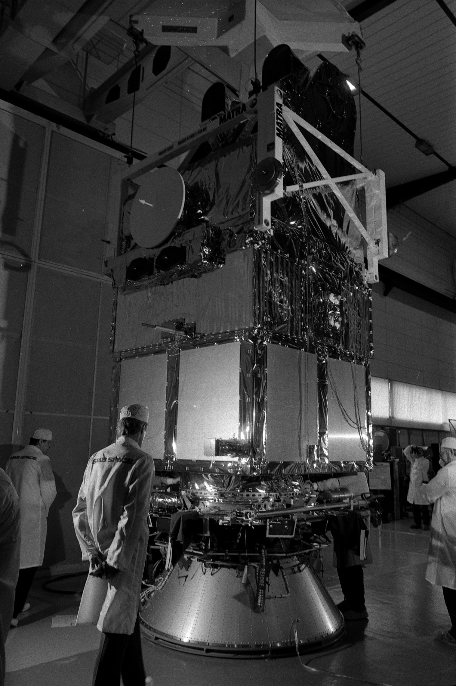 Dans les locaux d'Intespace sur le site du CNES (Centre National d'Etudes Spatiales). 11 mars 1985. Vue d'ensemble du satellite Spot 1 installé sur un banc de test aux vibrations ; autour techniciens en blouse. Observation: Satellite Spot 1 : plus gros satellite européen construit pour observer la Terre (images à haute résolution). Maîtrise d'oeuvre CNES. Intégration par Matra. Alcatel-Thomson Toulouse a fourni des équipements. Projet né en 1975 au CNES ; phase de réalisation a commencé en juin 1980. Mise en orbite prévue en octobre 1985 par Ariane 1. Création en parallèle de la société "Spot-Images" chargée de prospecter et de commercialiser le produit à l'échelle mondiale.